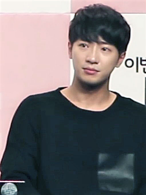 [TV10] 10월 26일 Jtbc '이번주 아내가 바람을 핍니다' 제작발표회 현장